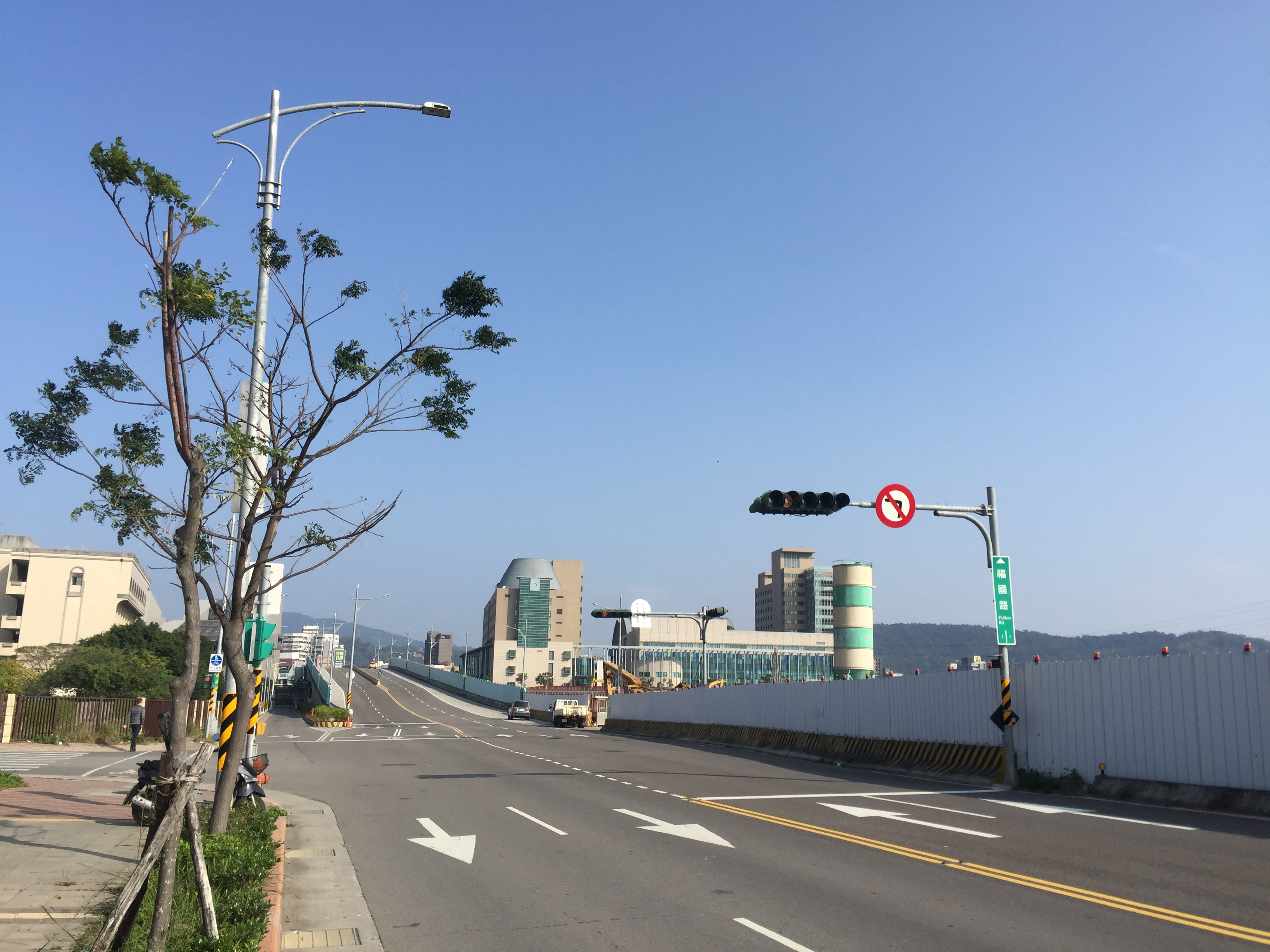 台北市北投區士林北投科技園區新設道路 福國路第一期延伸段